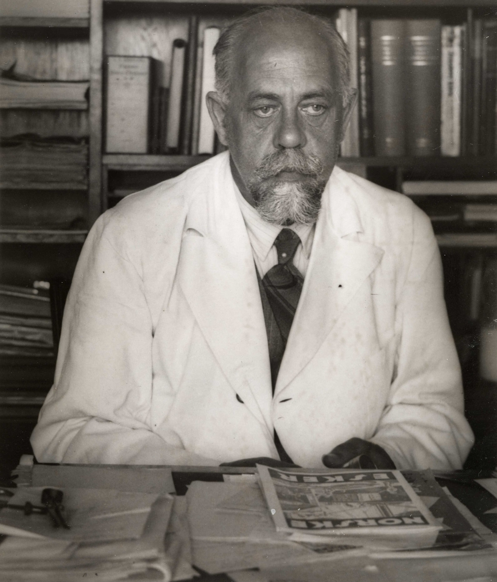 Olaf Hallan 1935